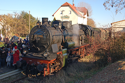 „Feuriger Elias“ der GES am 3.12.2016 im Bahnhof Weissach: Dampflok 38.3119 mit Plattformwagen.